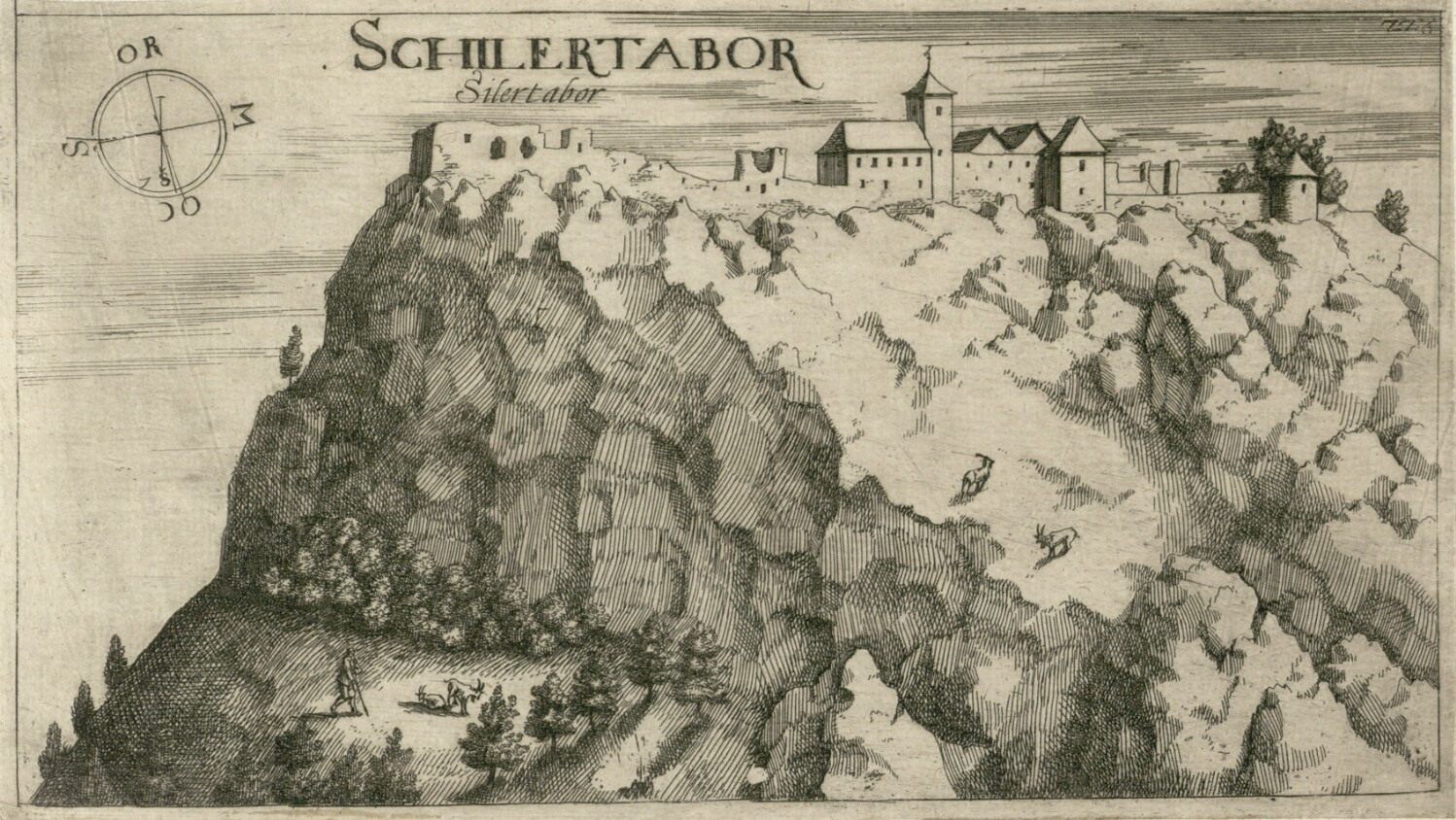 Grad Šilentabor